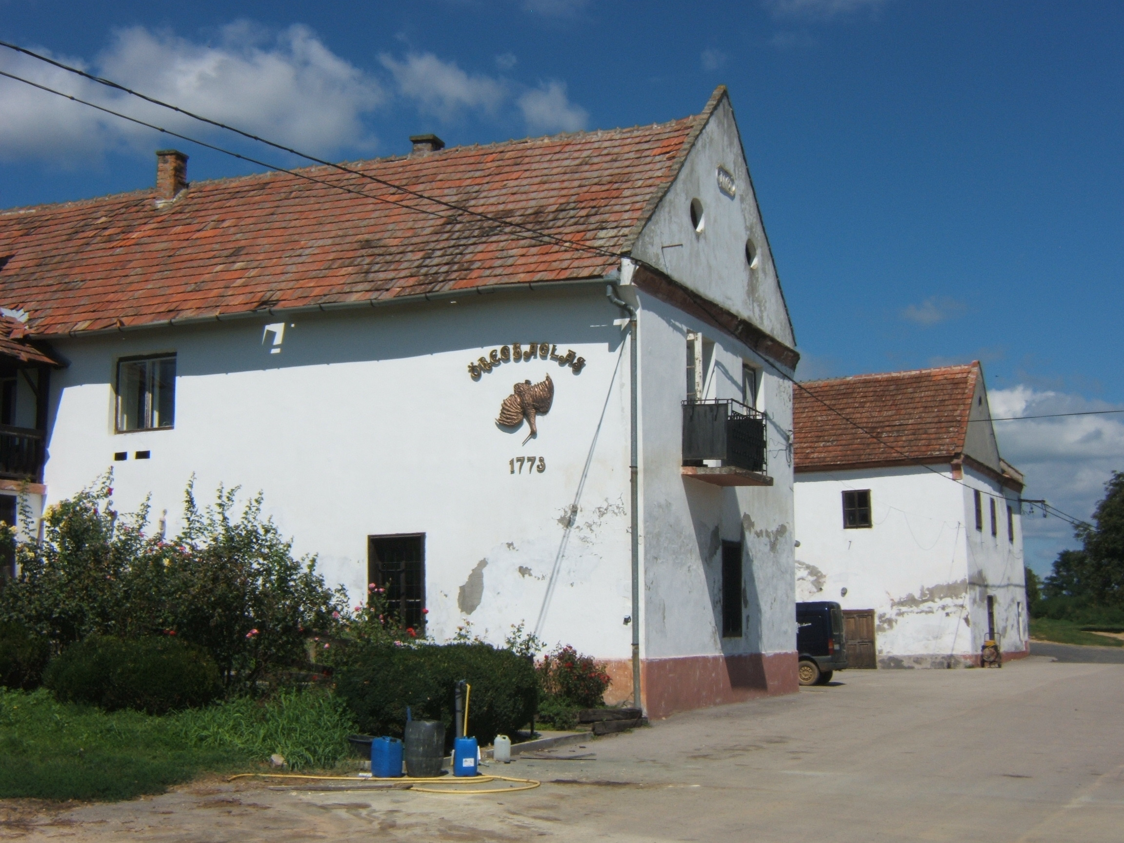 A kéthelyi Hunyady-pince